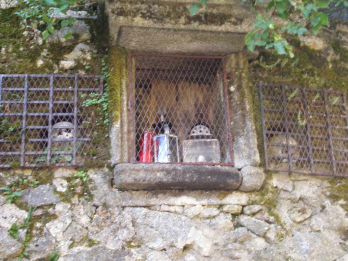 la alberca